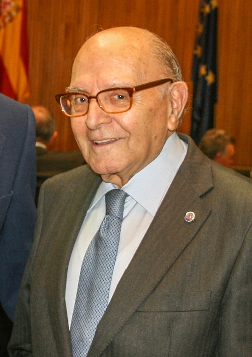 Fernando Alcón Sáez